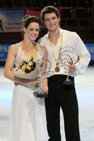 2009 Trophée Éric Bompard - Tessa Virtue and Scott Moir